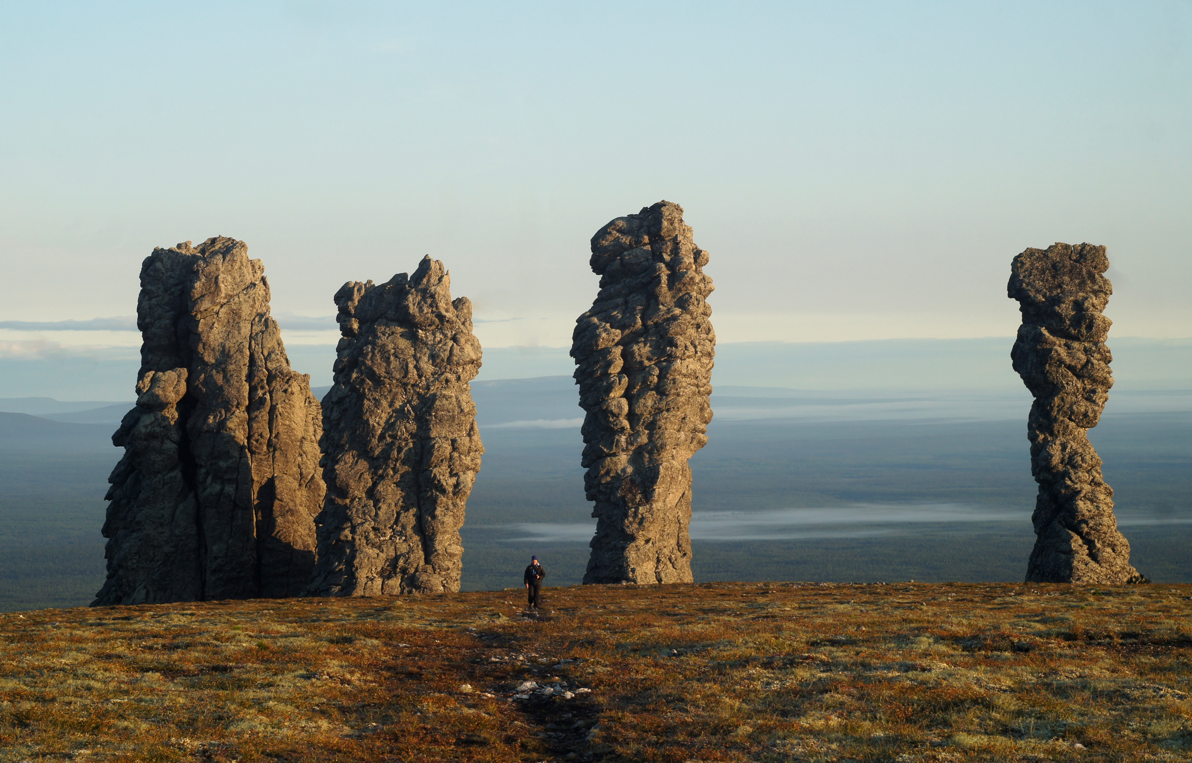 Столбы выветривания (Большие манзские болваны), Троицко-Печорский район This image is related to the protected area of Russia number 1110342